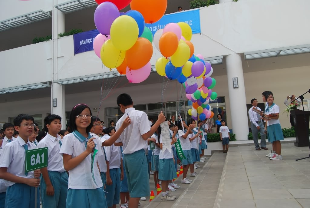 Lễ khai giảng của trường THCS-THPT Đinh Thiện Lý (LSTS), quận 7, TpHCM Việt Nam năm học 2010-2011